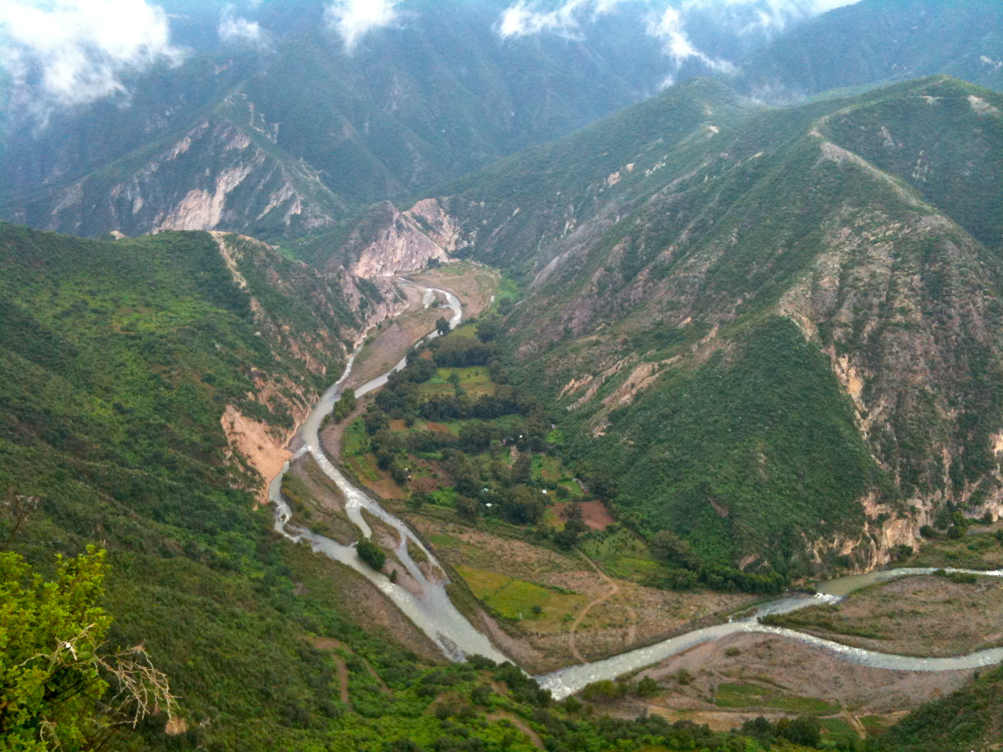 Río en lo profundo.